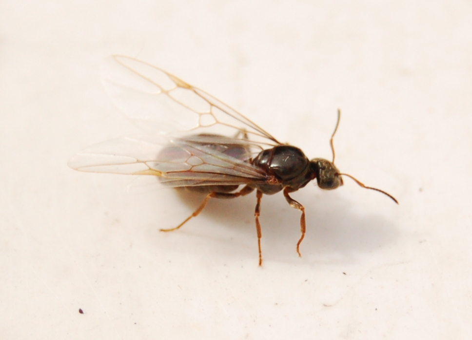 Princesse fourmis de type Lasius (?)